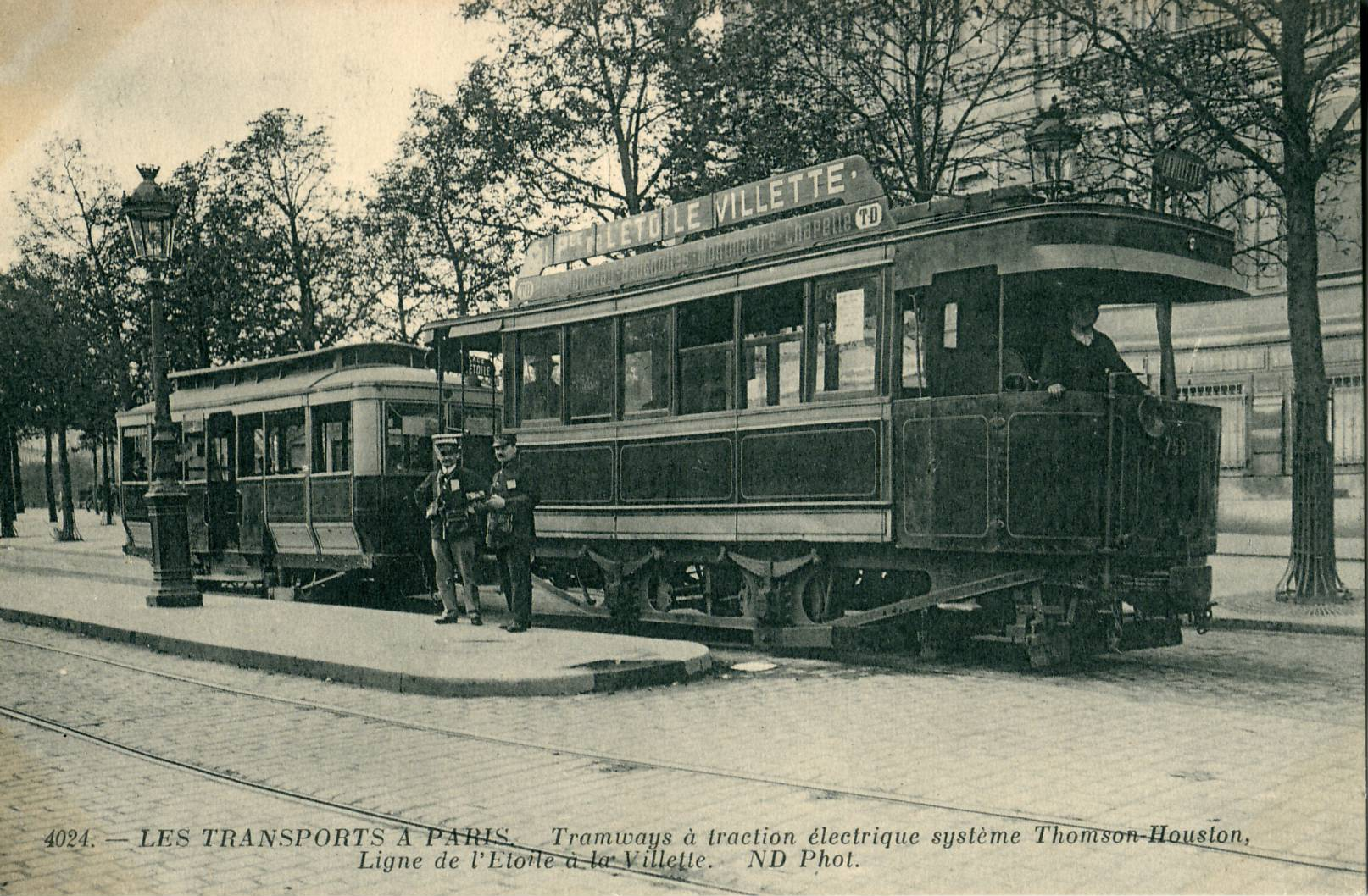 Carte postale ancienne éditée par ND, collection "Les transports à Paris" N° 4024Tramway à traction électrique système Thomson Houston, Ligne de l'Etoile à la Villette (ligne TD)Motrice Purrey sans impérialeA noter que Jean Robert ("Les tramways parisiens", édition 1992, page 115, mentionne, malgré la légende de cette carte postale, qu'il s'agirait d'une motrice à vapeur système Purrey sans impériale de 1904)